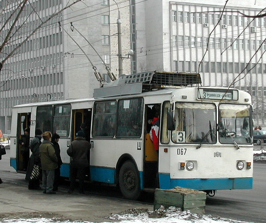 Belkommunmash trolleybus, AKCM-101 model, in Brest